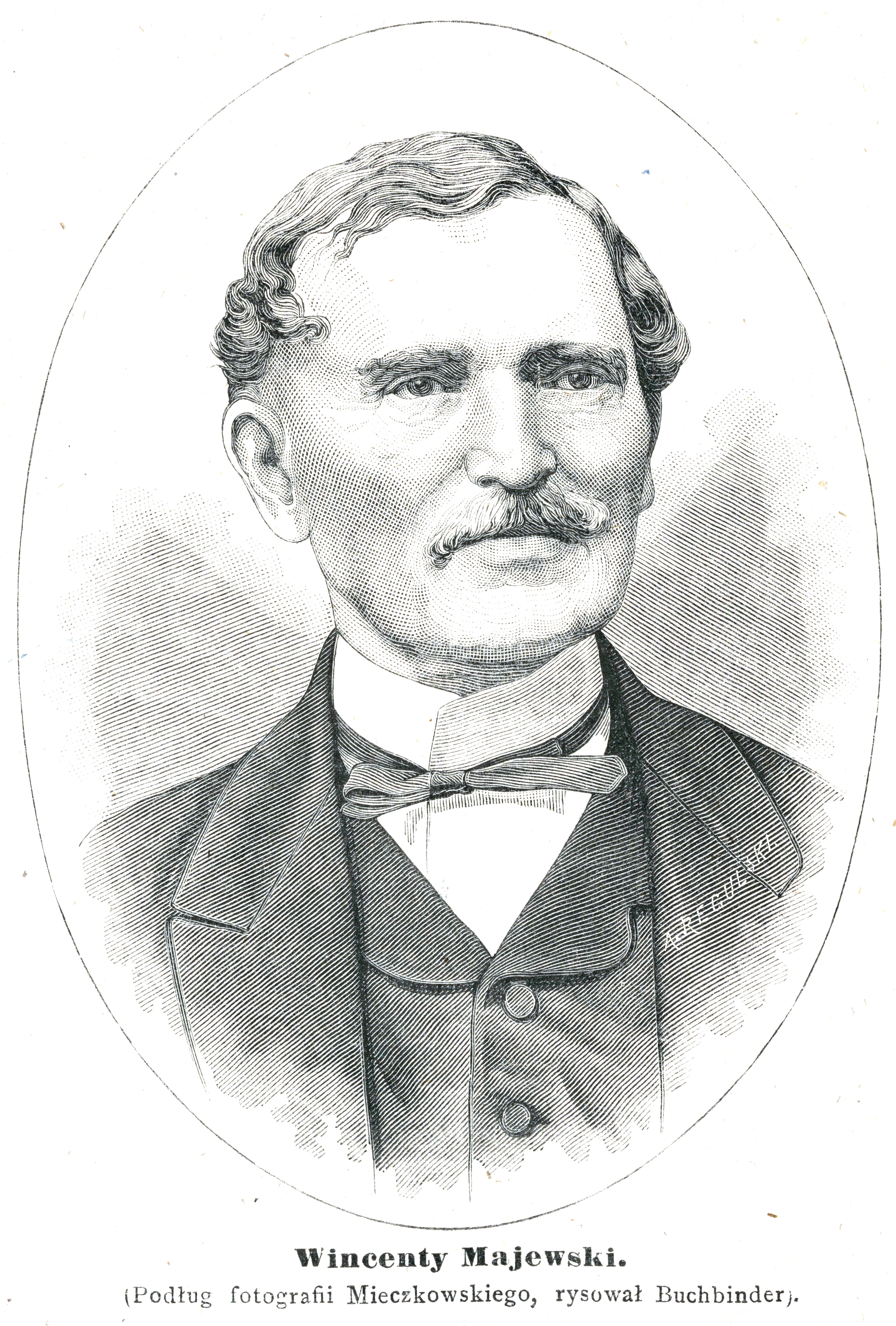 polski adwokat, radca prawny, obrońca sądowy, patron Trybunału Cywilnego w Warszawie